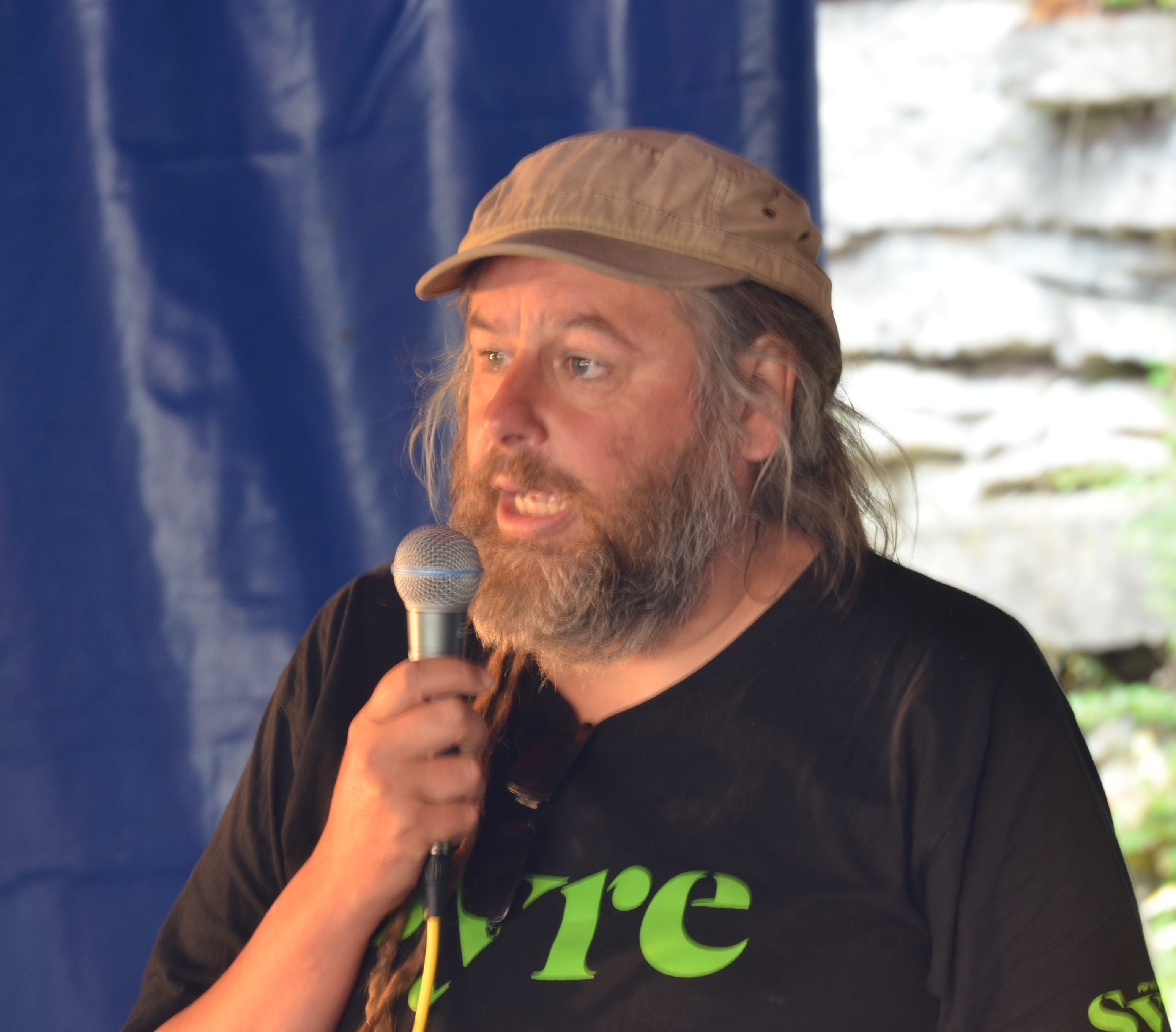 Lennart Fernström i Almedalsveckan 2016.